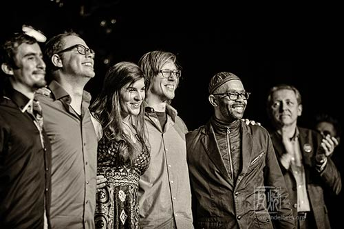 Die Gewinner des Neuen Deutschen Jazzpreis 2015: Filipppa Gojo Quartett. Mit Kurator Kenny Garrett und Mannheims OB Peter Kurz.